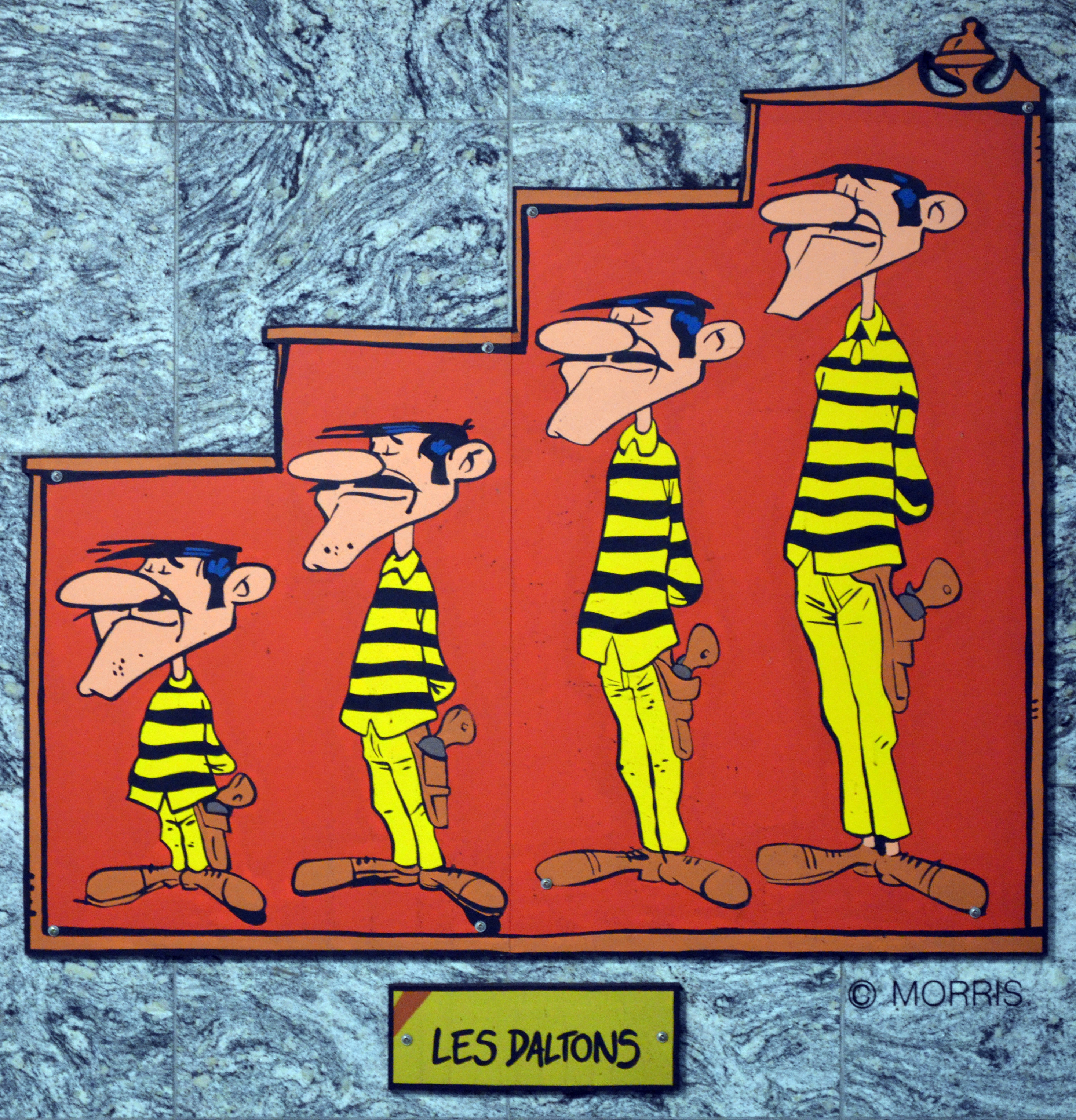 Charleroi (Belgique) - Station Janson du métro léger. Frères Dalton (Lucky Luke).